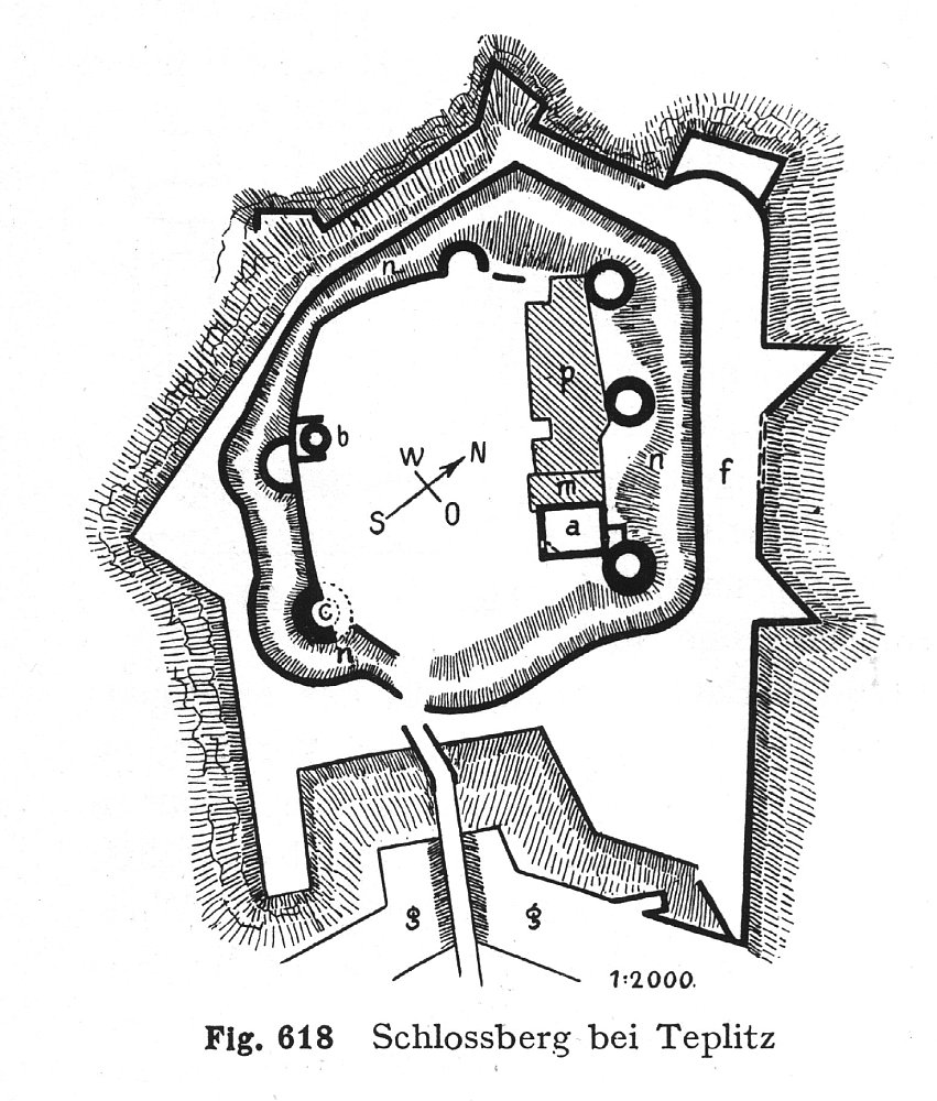 Schlossberg bei Teplitz (Doubravská hora), Grundriss